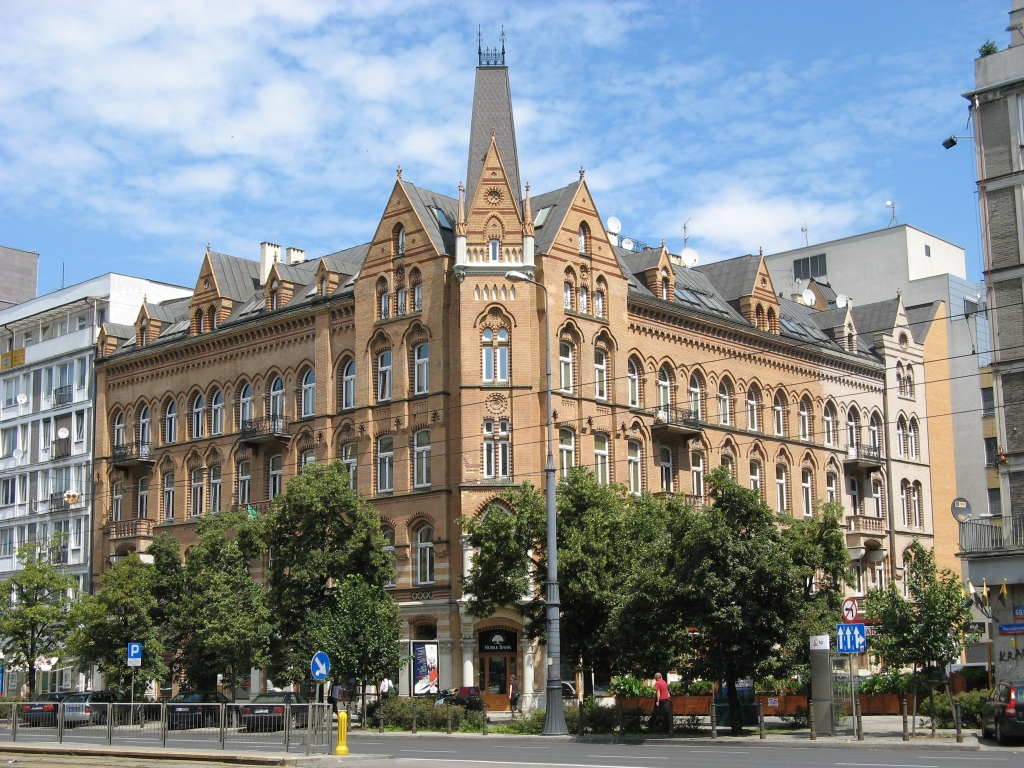 Kamienica Matiasa Taubenhausa.